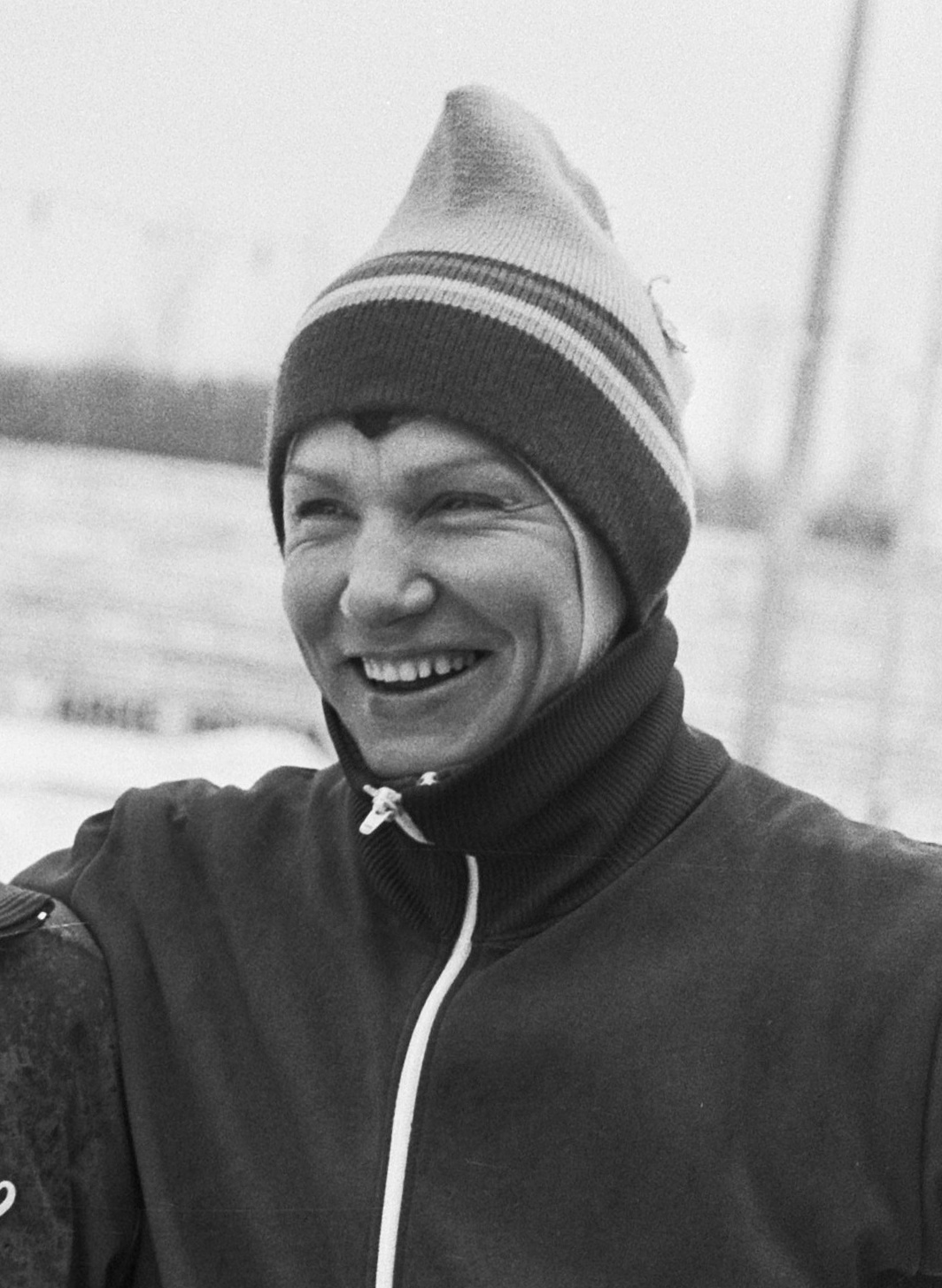 Wereldkampioenschappen schaatsen dames allround in Den Haag.; Tatyana Averina (USSR)